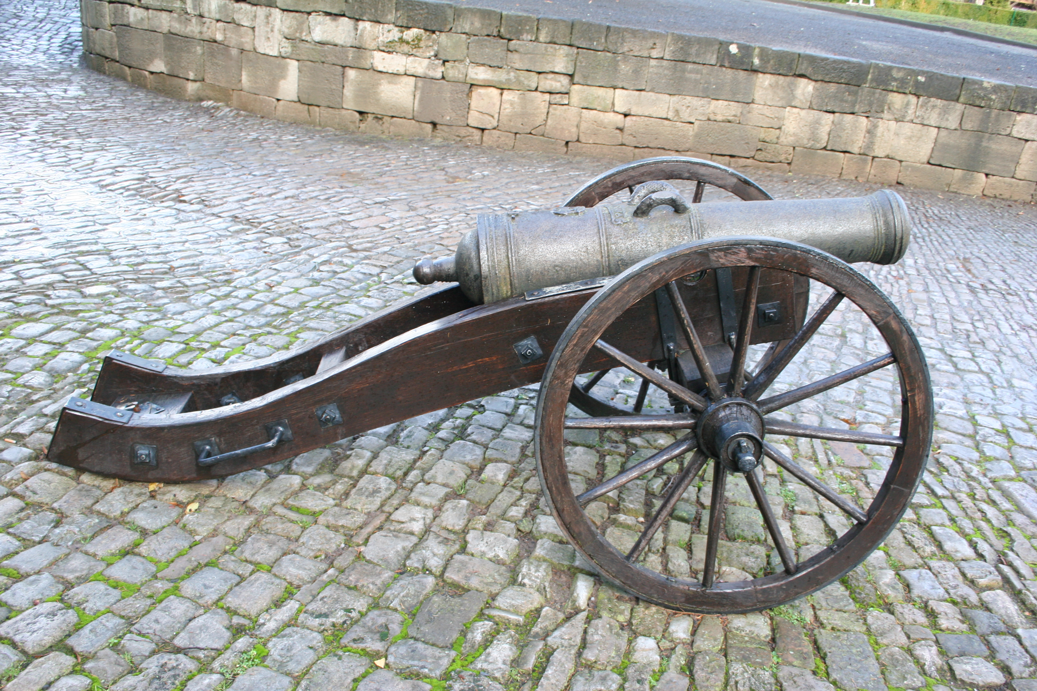 Sächsisches Geschütz 1691 (gusseisernes Falkonett) im Innenhof der Burg Creuzburg (Rohrlänge 147 cm, Kaliber 8 cm, Zündloch oben)